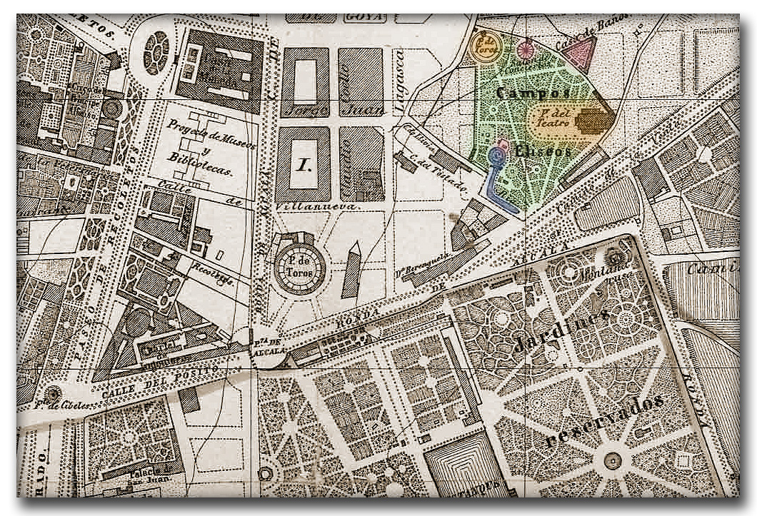 Emplazamiento aproximado de los Campos Elíseos en un plano del Madrid hacia 1866.